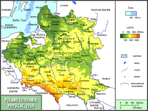 Poland-Lithuania, Physical 1764/Mapa fizyczna Rzeczypospolitej, 1764